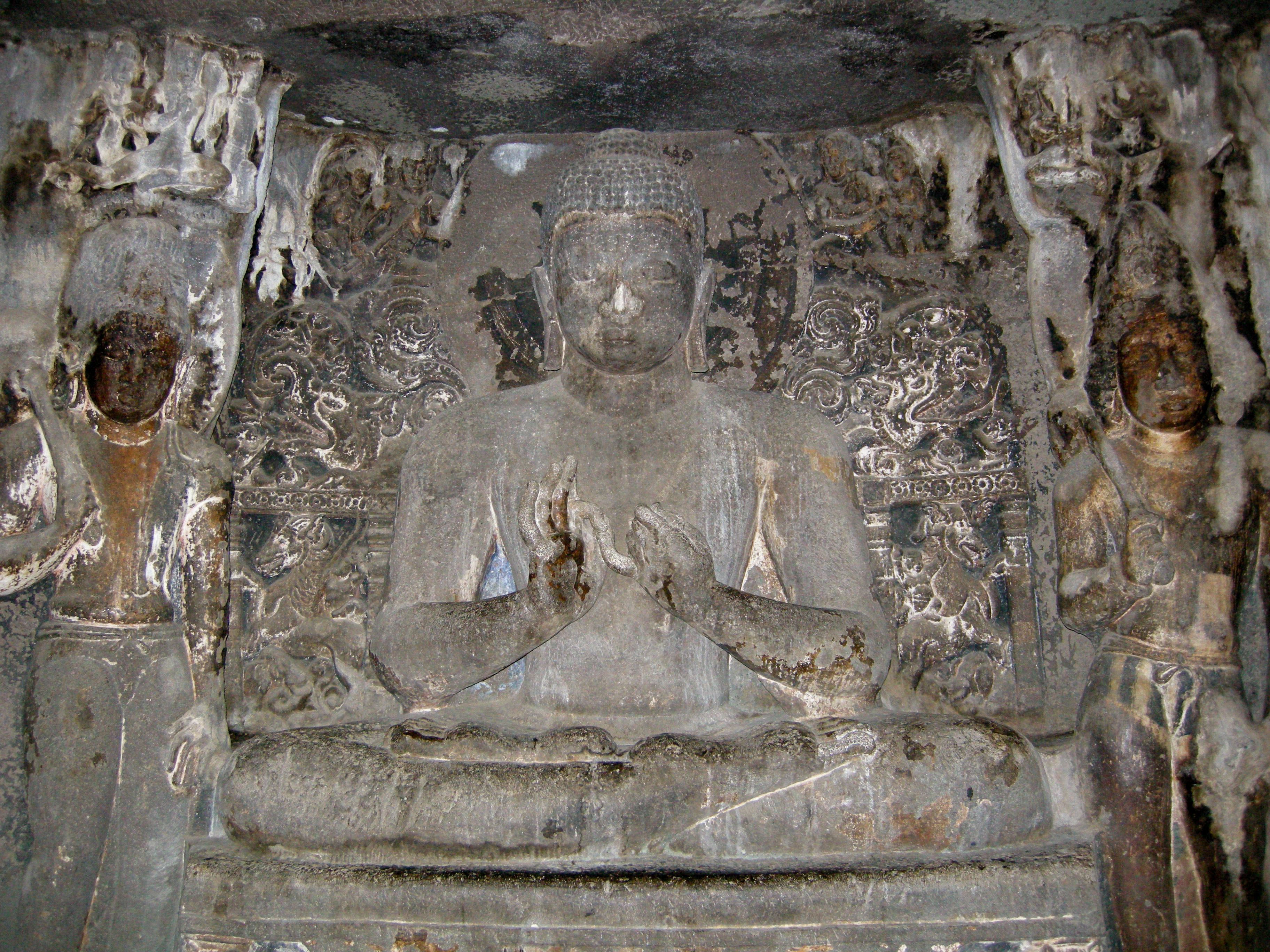 Es zeigt einen Buddhaschrein im oberen Geschoß der Höhle 6 von Ajanta.